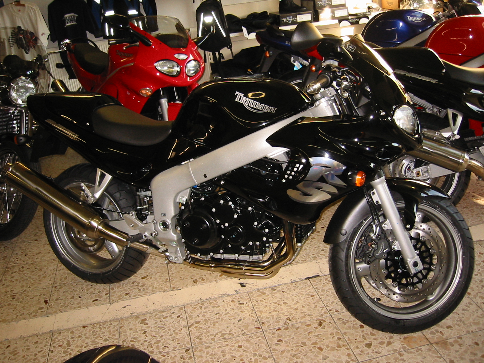 Bild einer Triumph Sprint RS Baujahr 2002